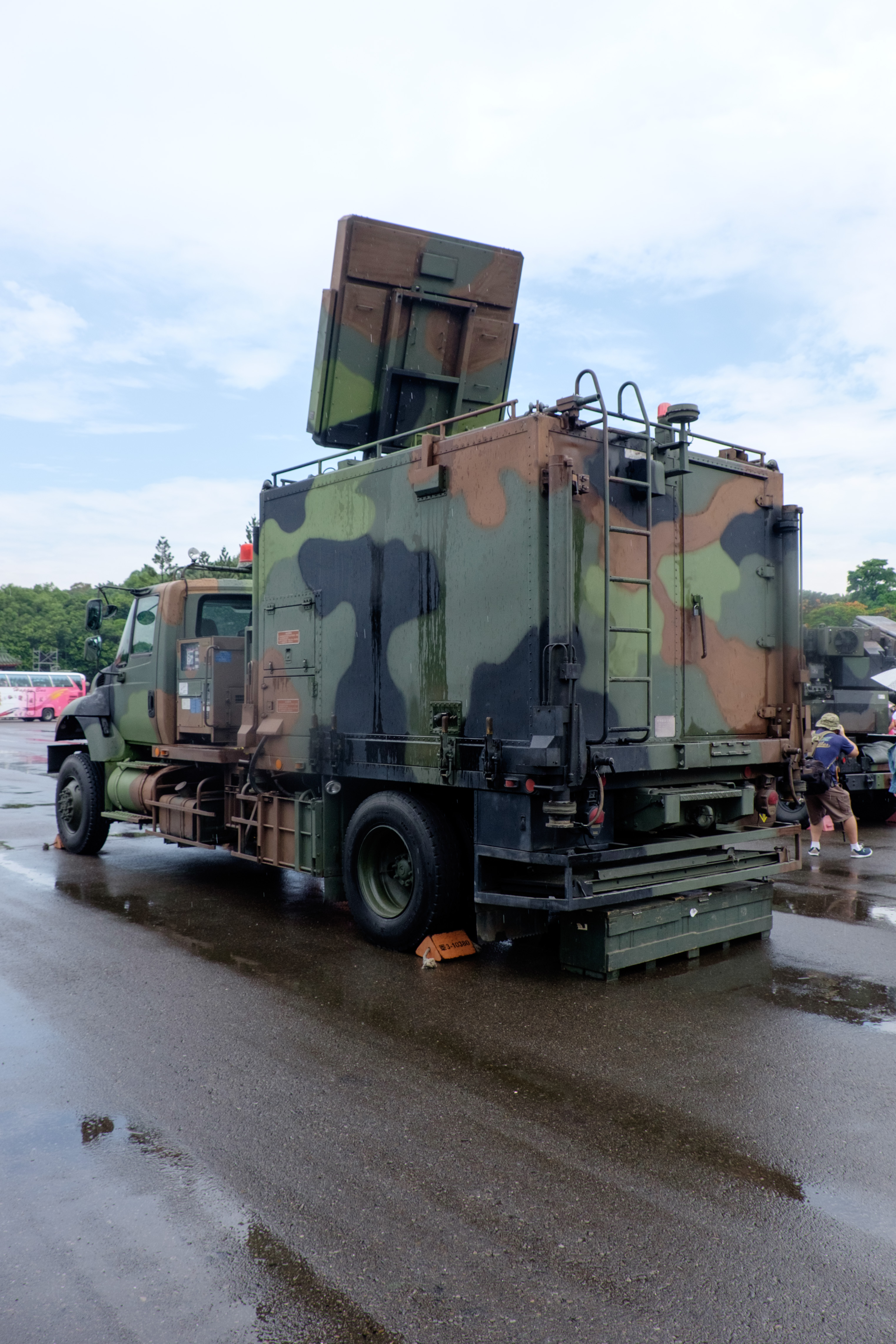 2015年成功嶺營區開放活動，介壽臺大校場展示陸軍蜂眼雷達系統車左後方。